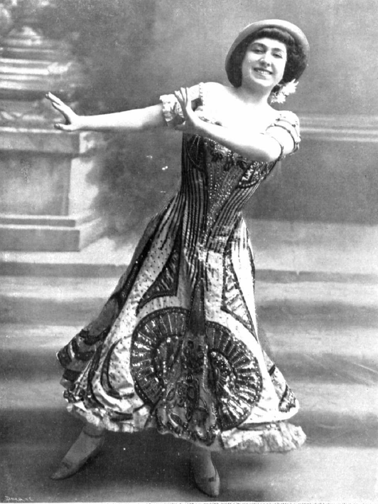 Fotografía de la cantante Julia Fons bailando el garrotín en el Teatro Eslava en 1911